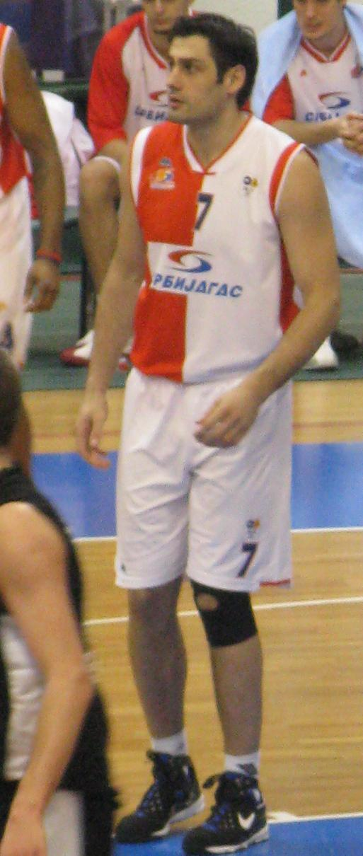 Jovo Stanojević